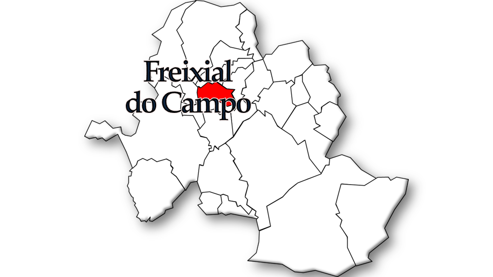 População